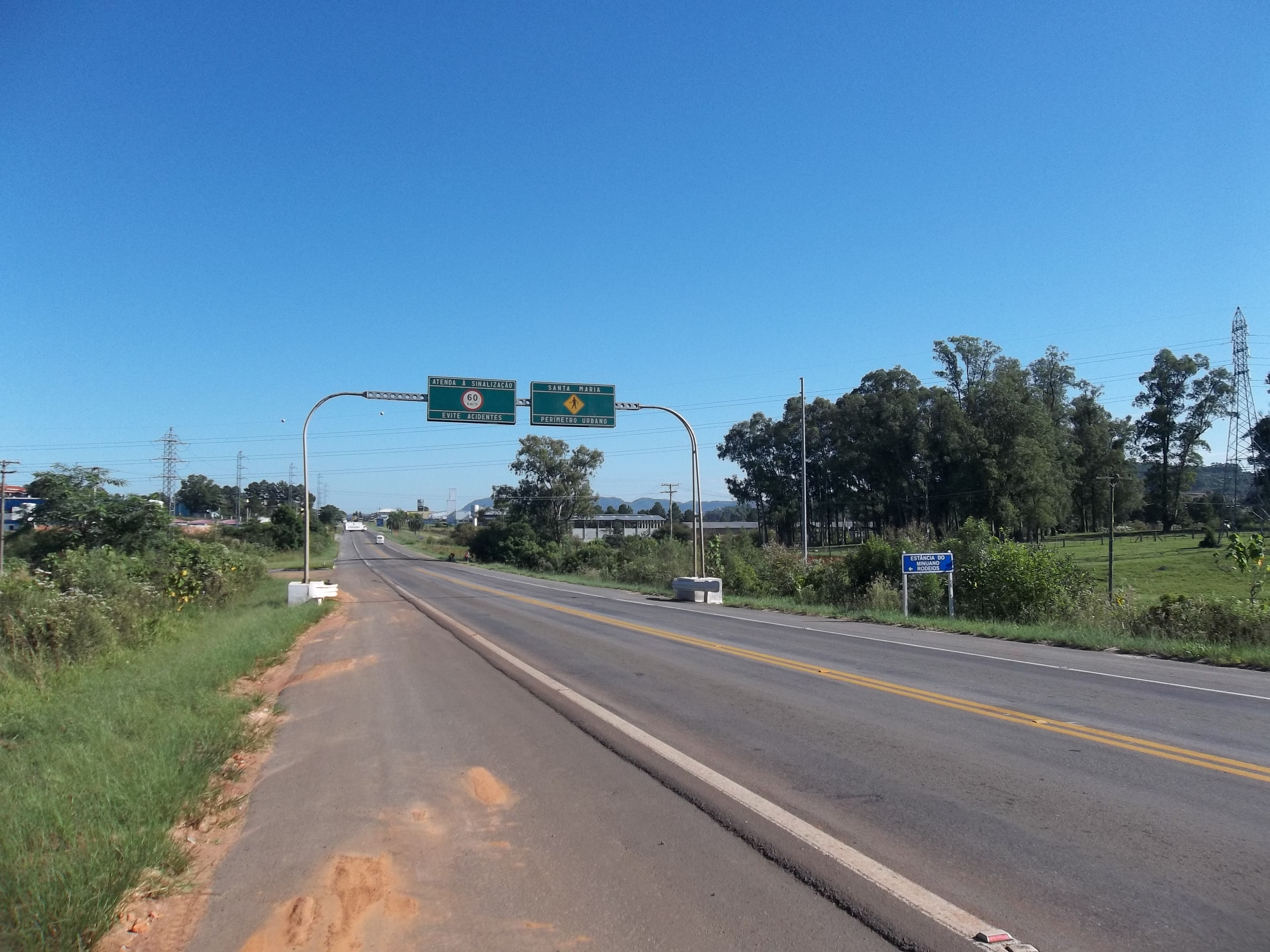 BR-392. Limite dos bairros Tomazetti (a direita) e Lorenzi (a esquerda). Santa Maria, RS - Brasil